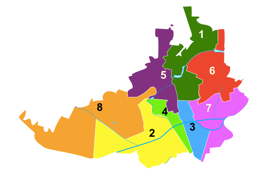 Rostov sur le Don, districts avec numéros